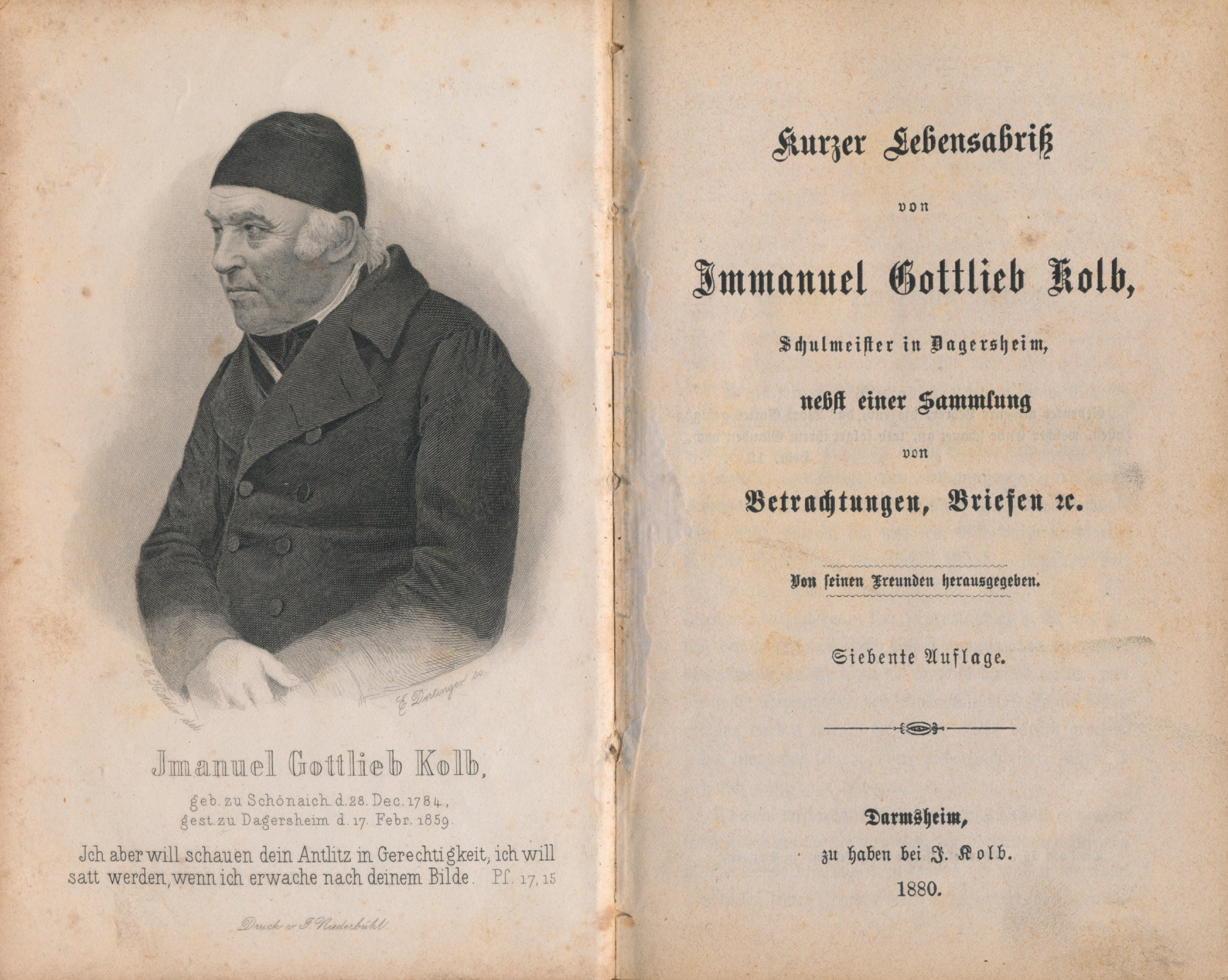 Kurzer Lebensabriß von Immanuel Gottlieb Kolb, Schulmeister in Dagersheim, nebst einer Sammlung von Betrachtungen, Briefen etc., 7. Auflage, Darmsheim 1880. Frontispiz. Aus der Sammlung von Peter Schmelzle, Bad Wimpfen.